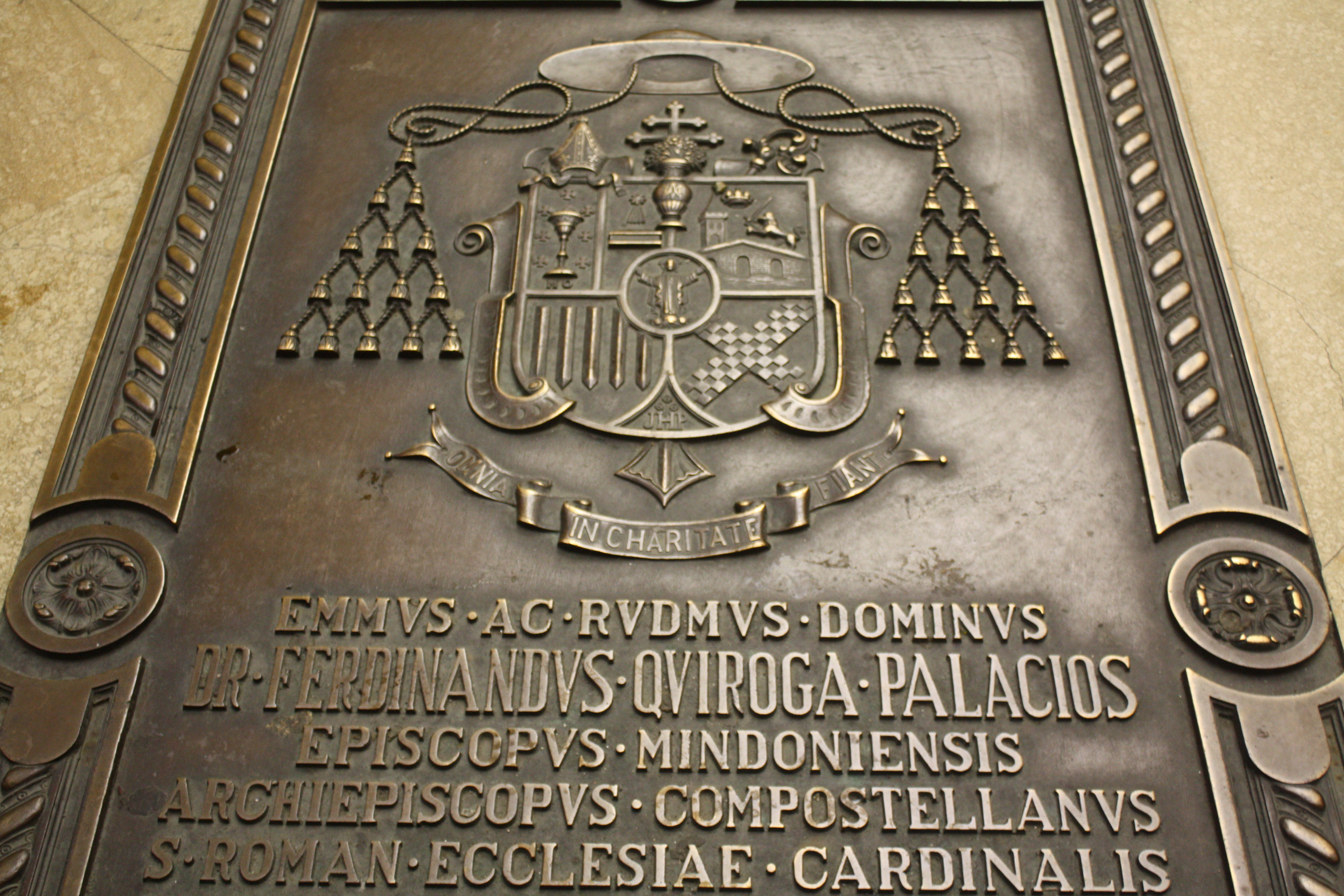 Tumba del cardenal Fernando Quiroga Palacios (1900-1971), que fue arzobispo de Santiago de Compostela.